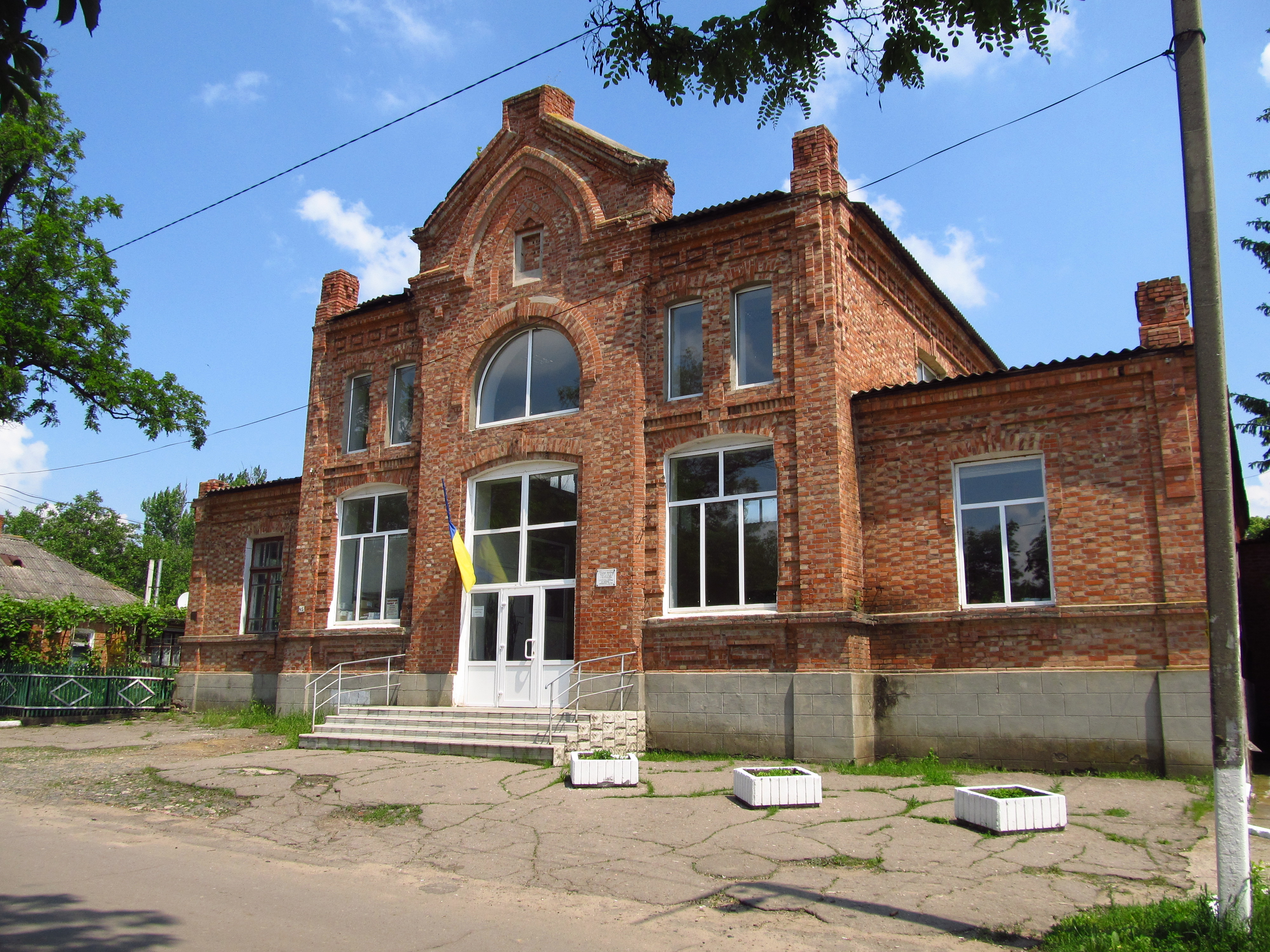 Жіноча прогімназія, Ананьїв, вул. Леніна, 45